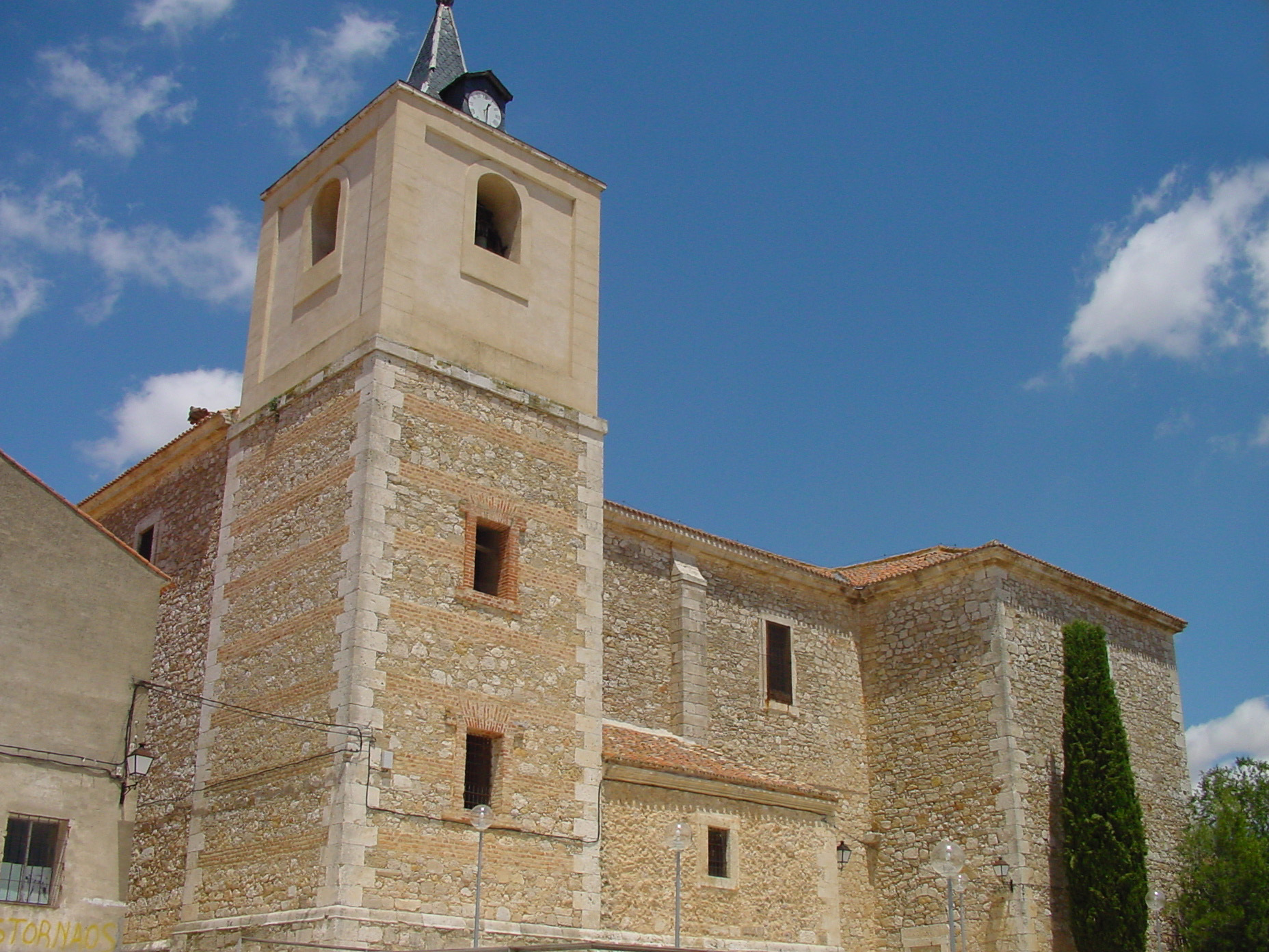 Iglesia en Valdaracete.